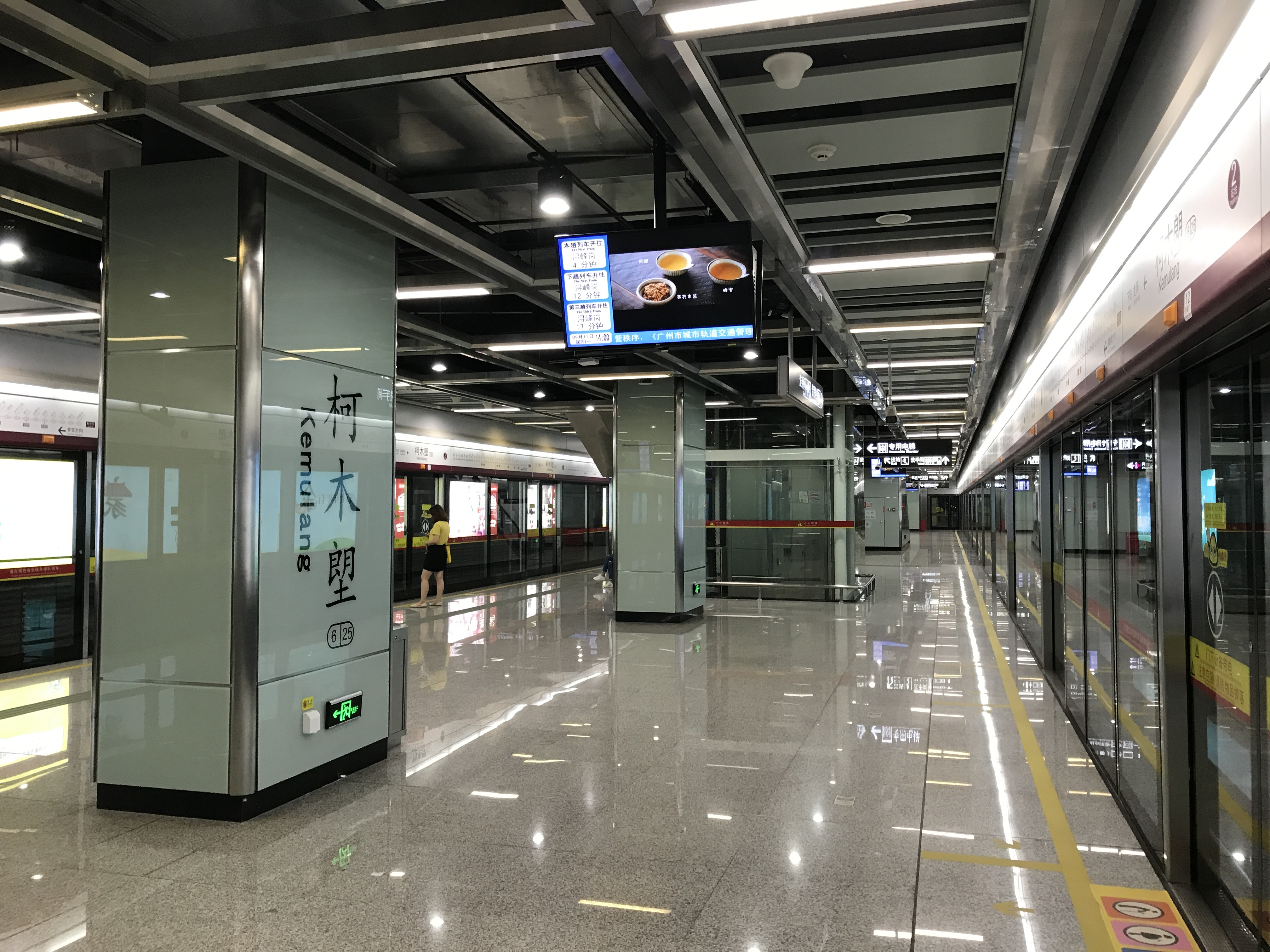 广州地铁柯木塱站